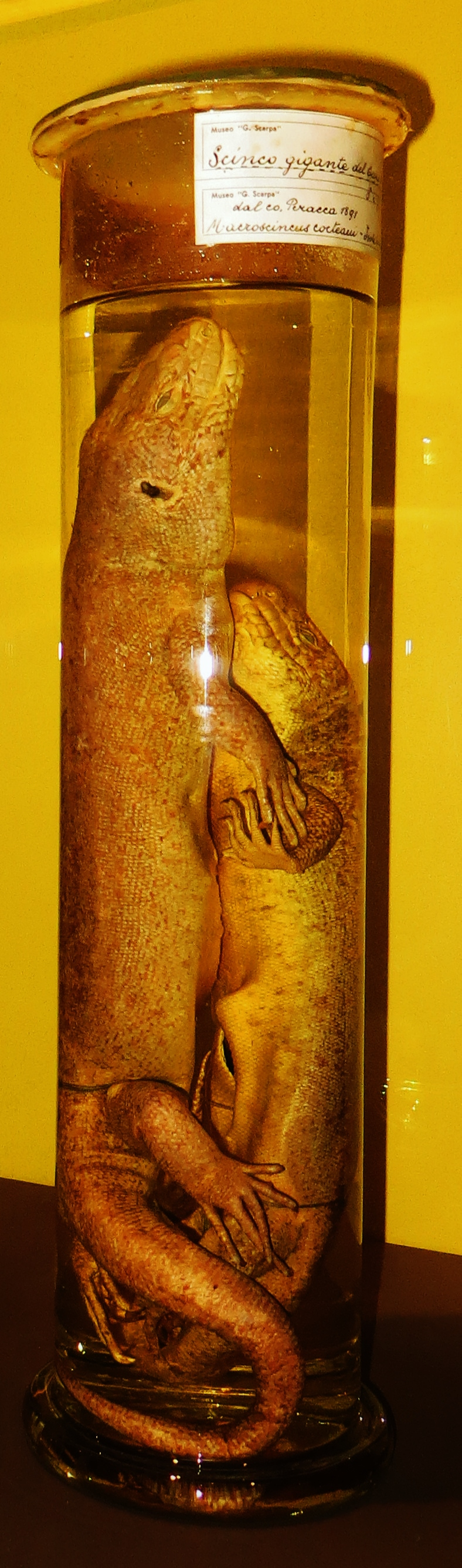 Chioninia coctei - Took the picture at MUSE, Trento